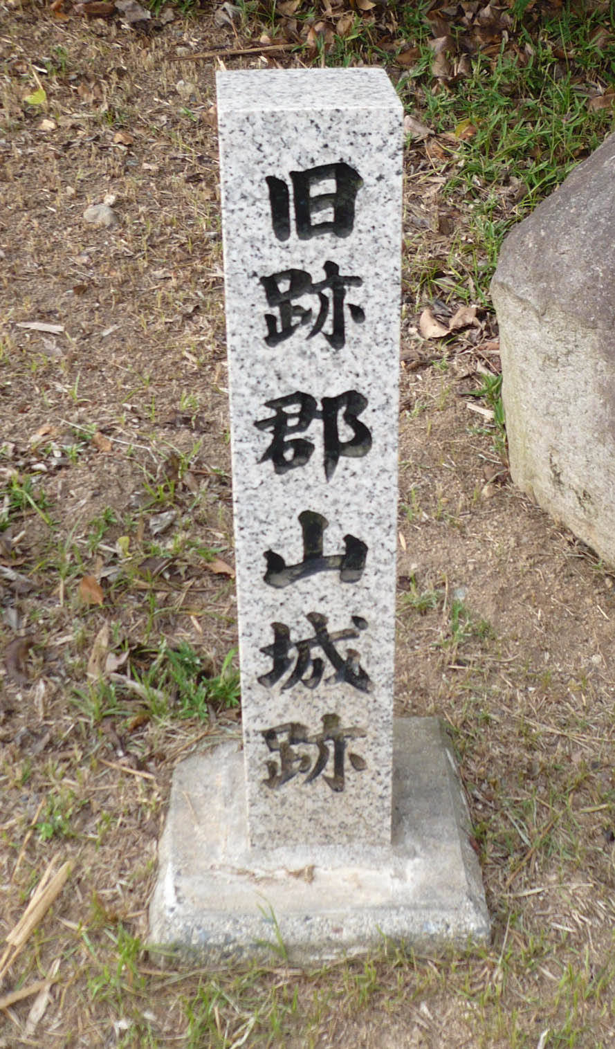 郡山城の石碑